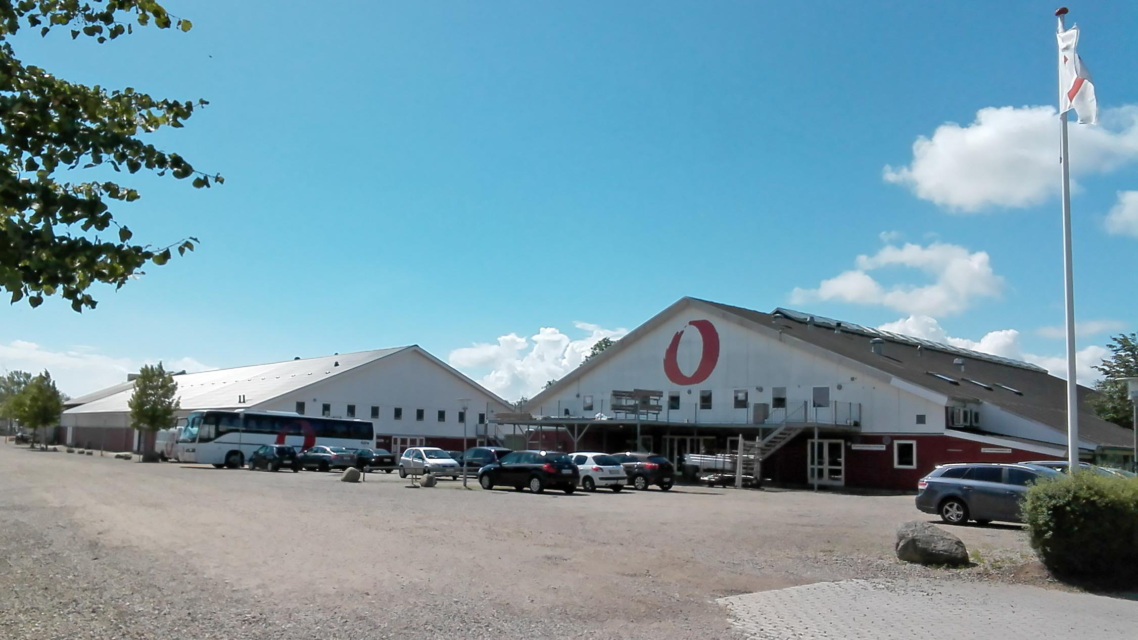 Oure-skolernes haller